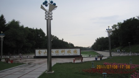 Park mit großangelegten Wasserflächen in Wuchang, in der Provinz Heilongjang, Metropolregion Harbin